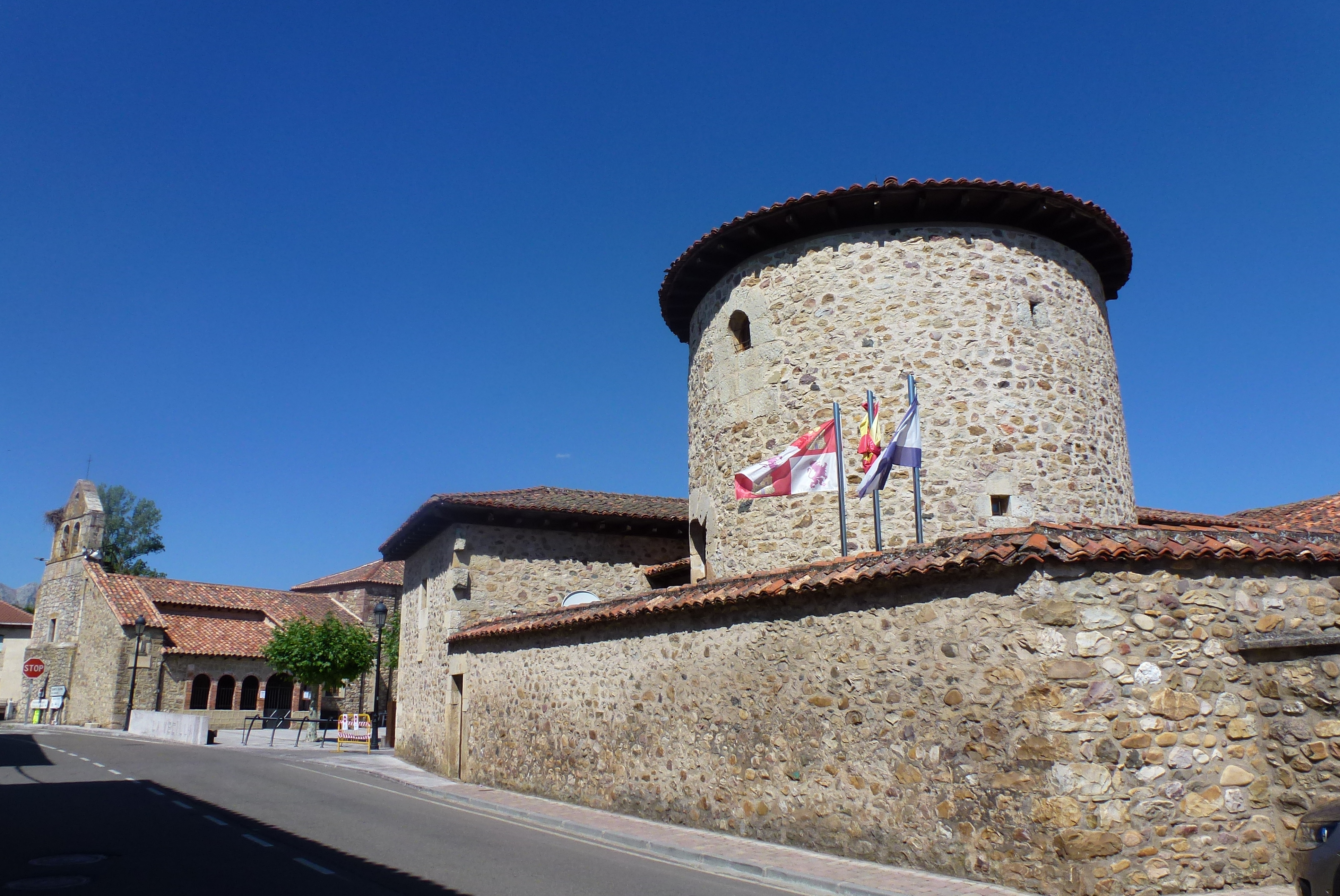 La Vecilla